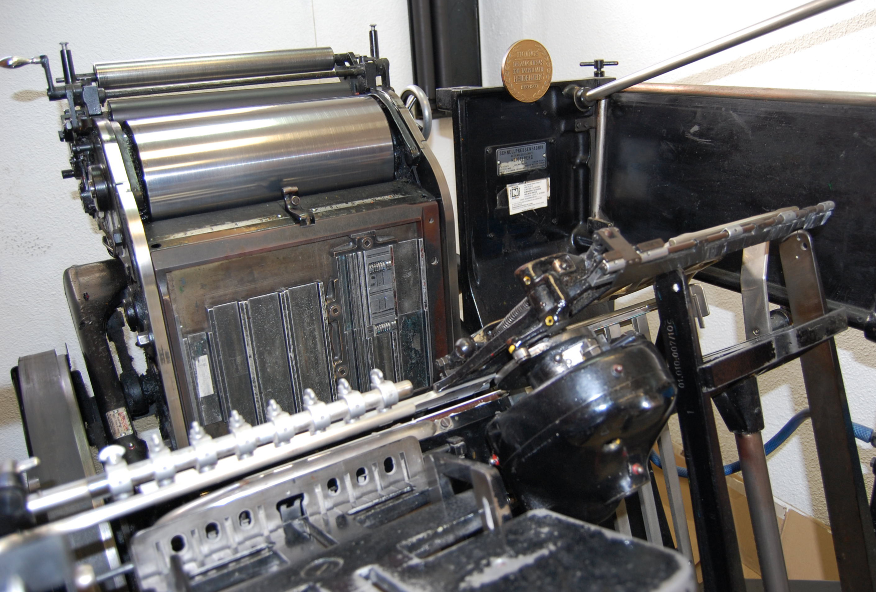 Heidelberg Minerva màquina tipogràfica